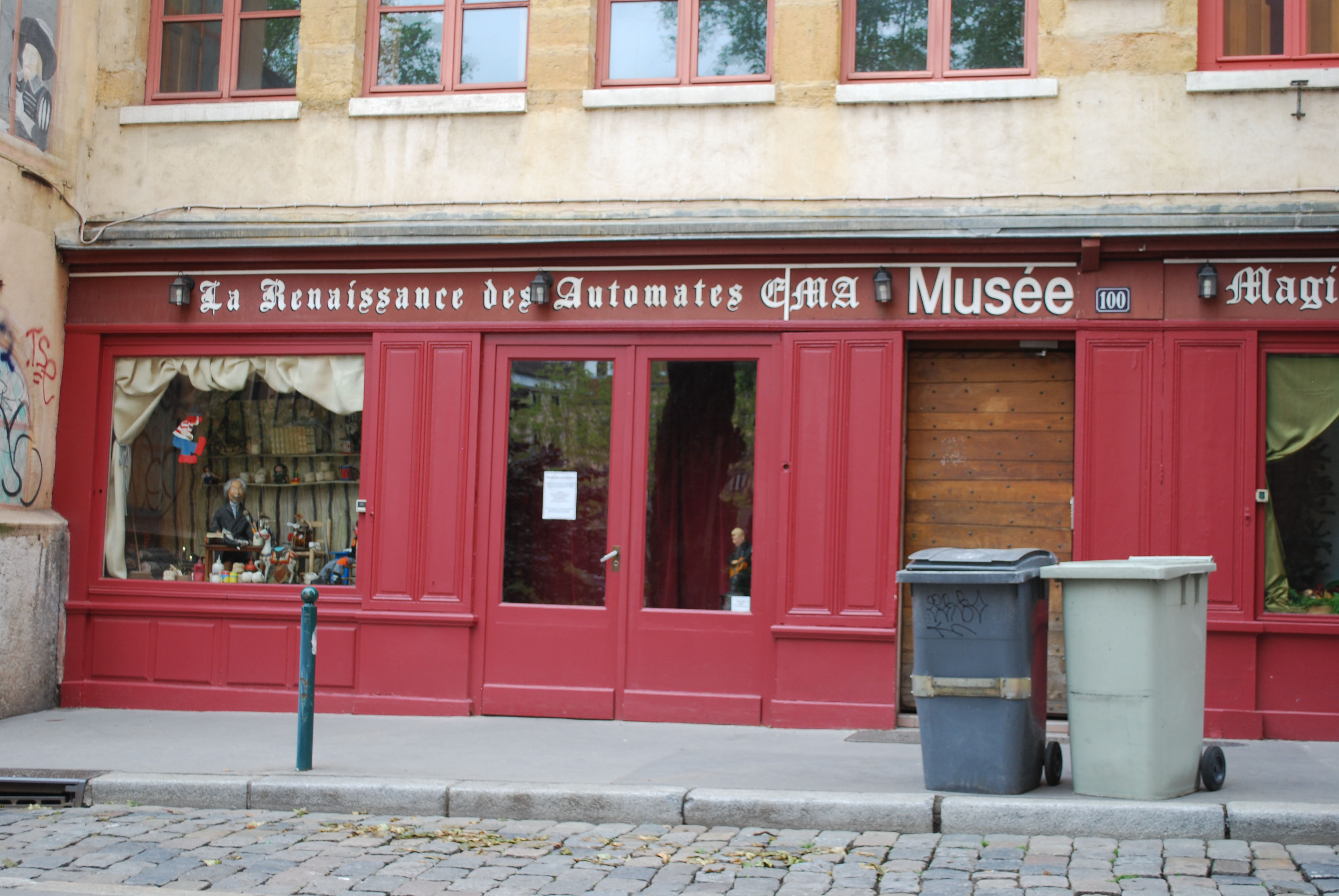 Musee des Automates